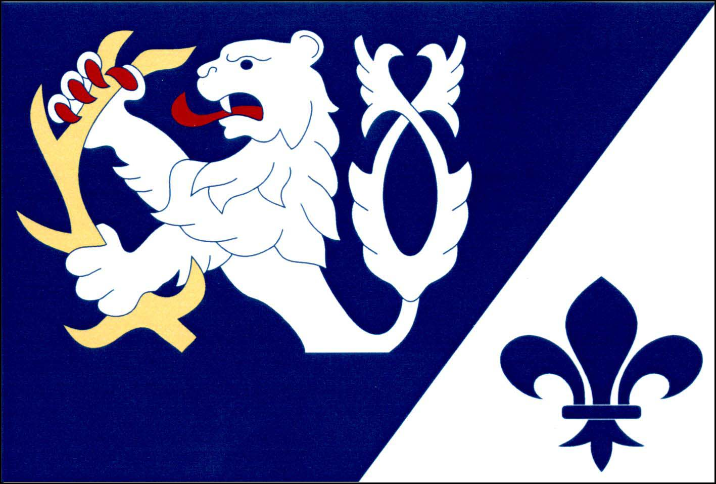 Vlajka obce Nová Ves (okres Mělník)